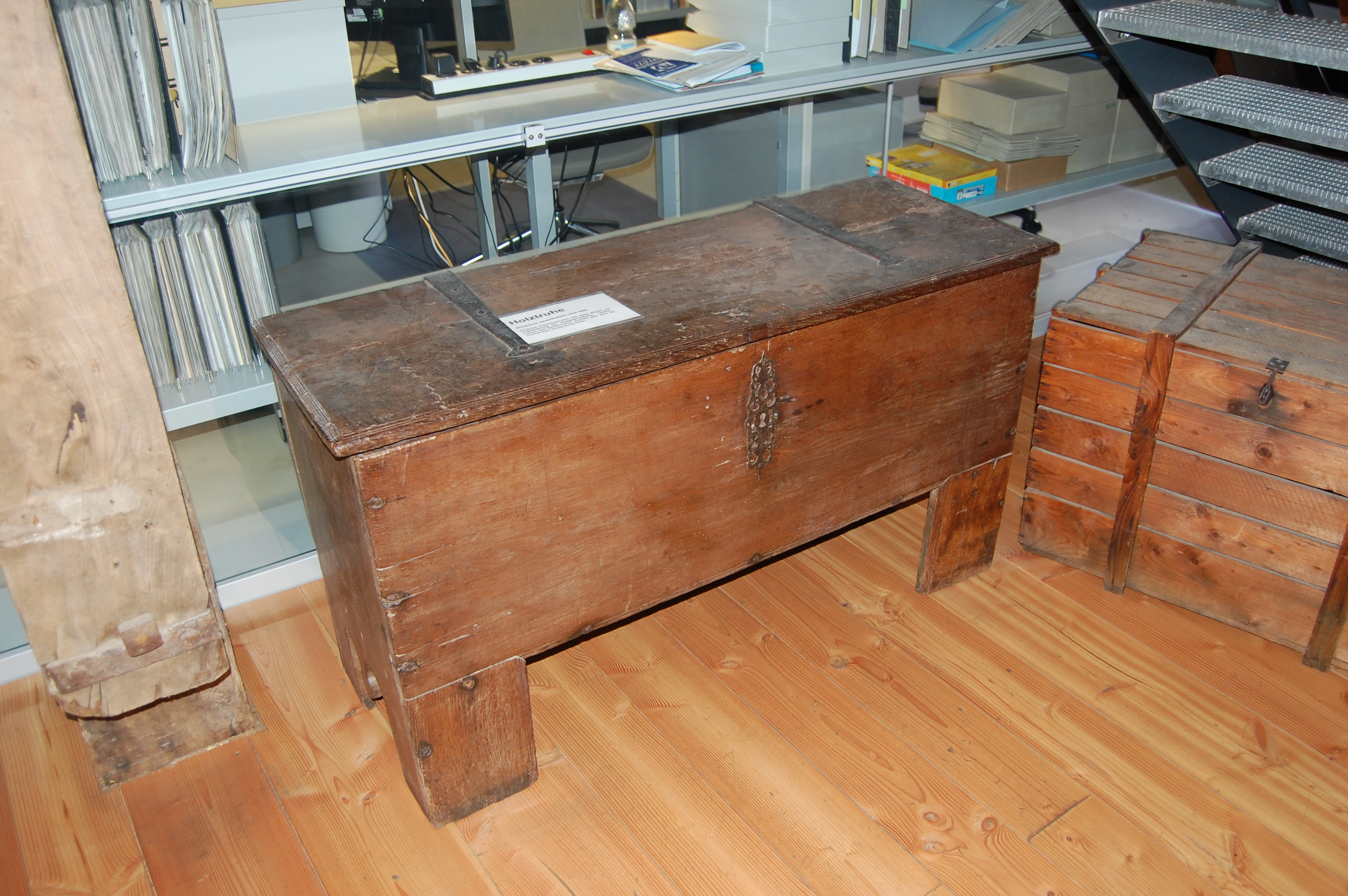 Alte Archivalientruhe im Stadtarchiv Arnsberg